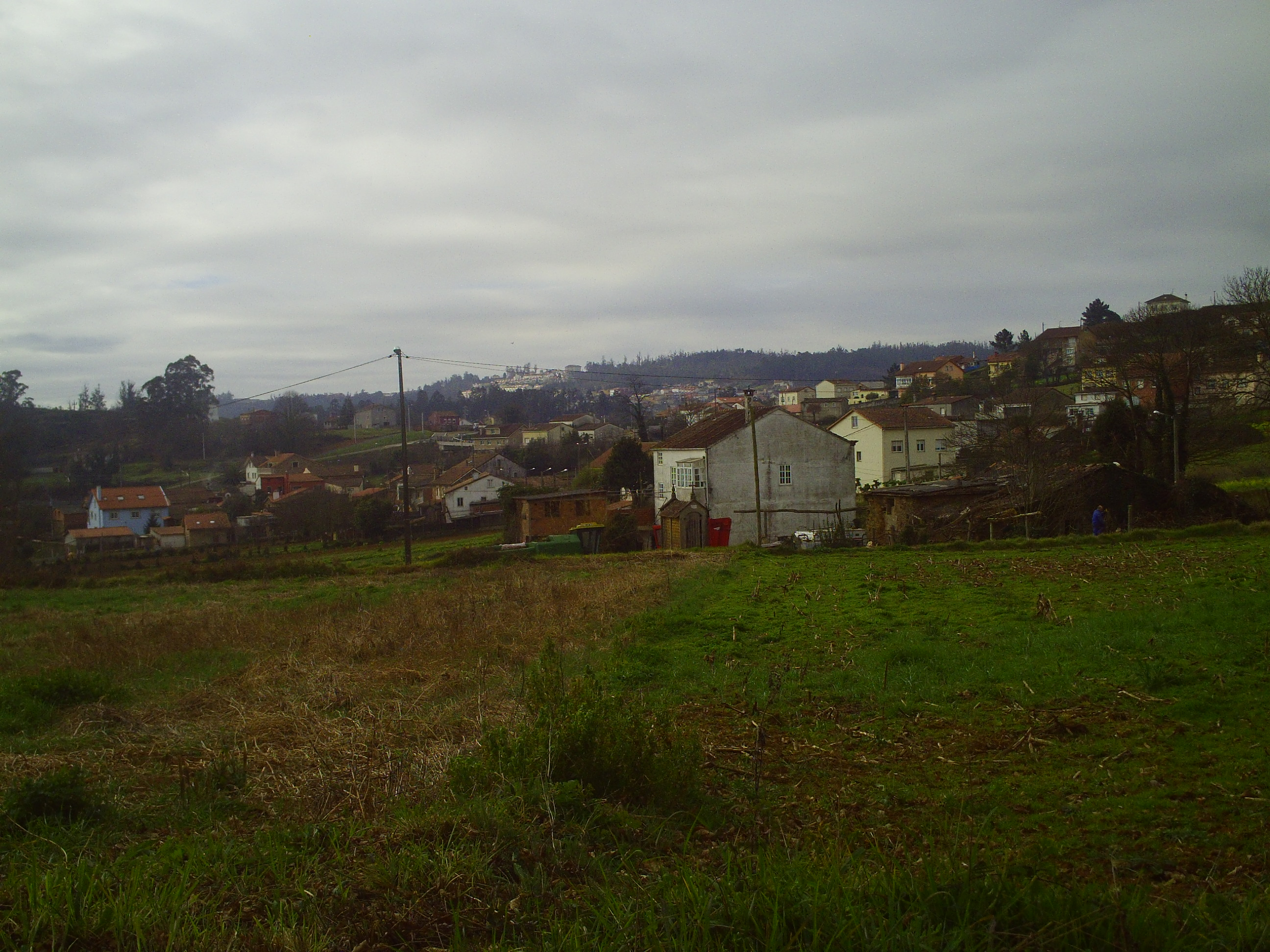 Angrois, Panorámicas de la aldea